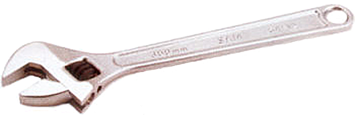 Clé à molette